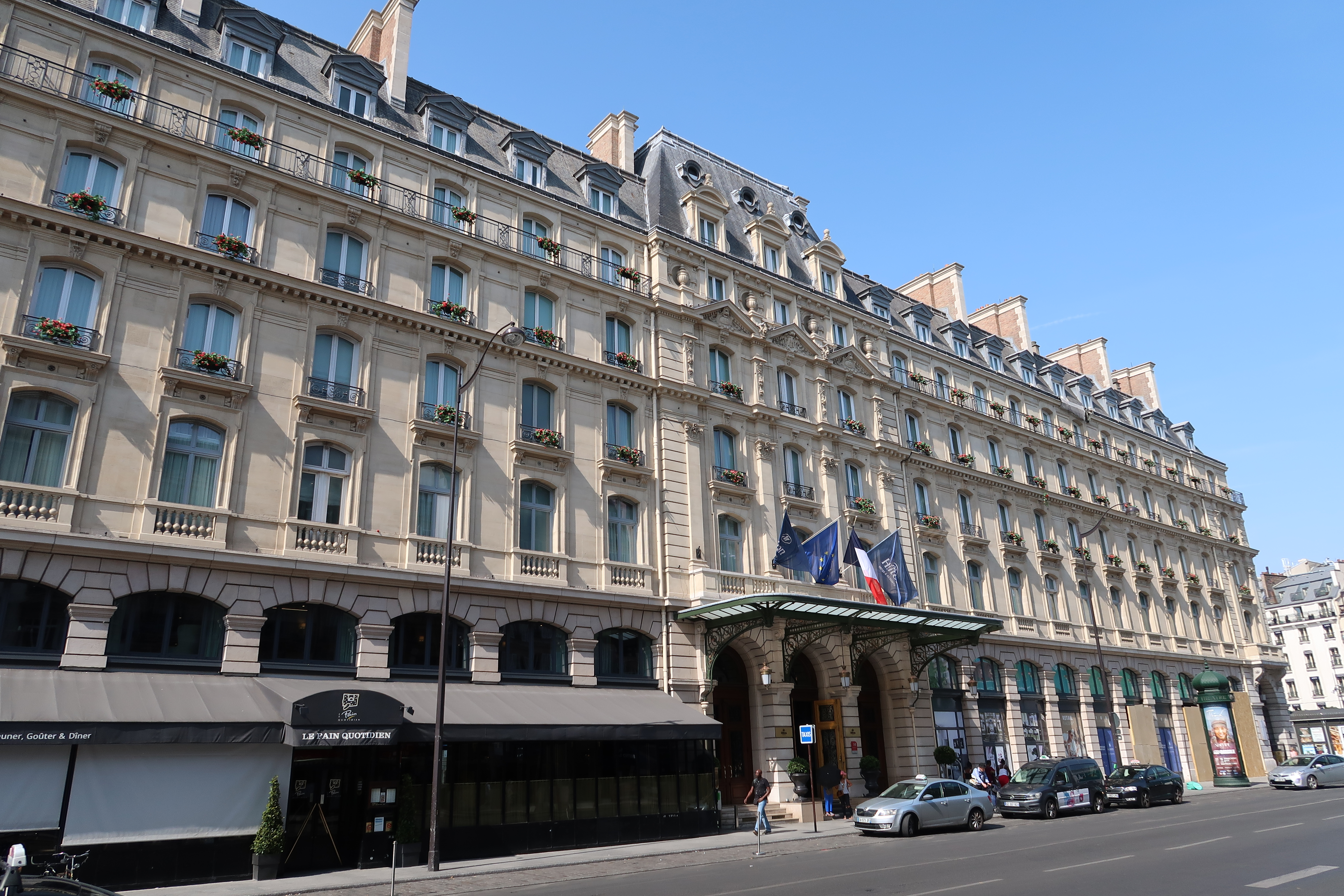 Hôtel Terminus, 108 rue Saint-Lazare (Paris, 8e).